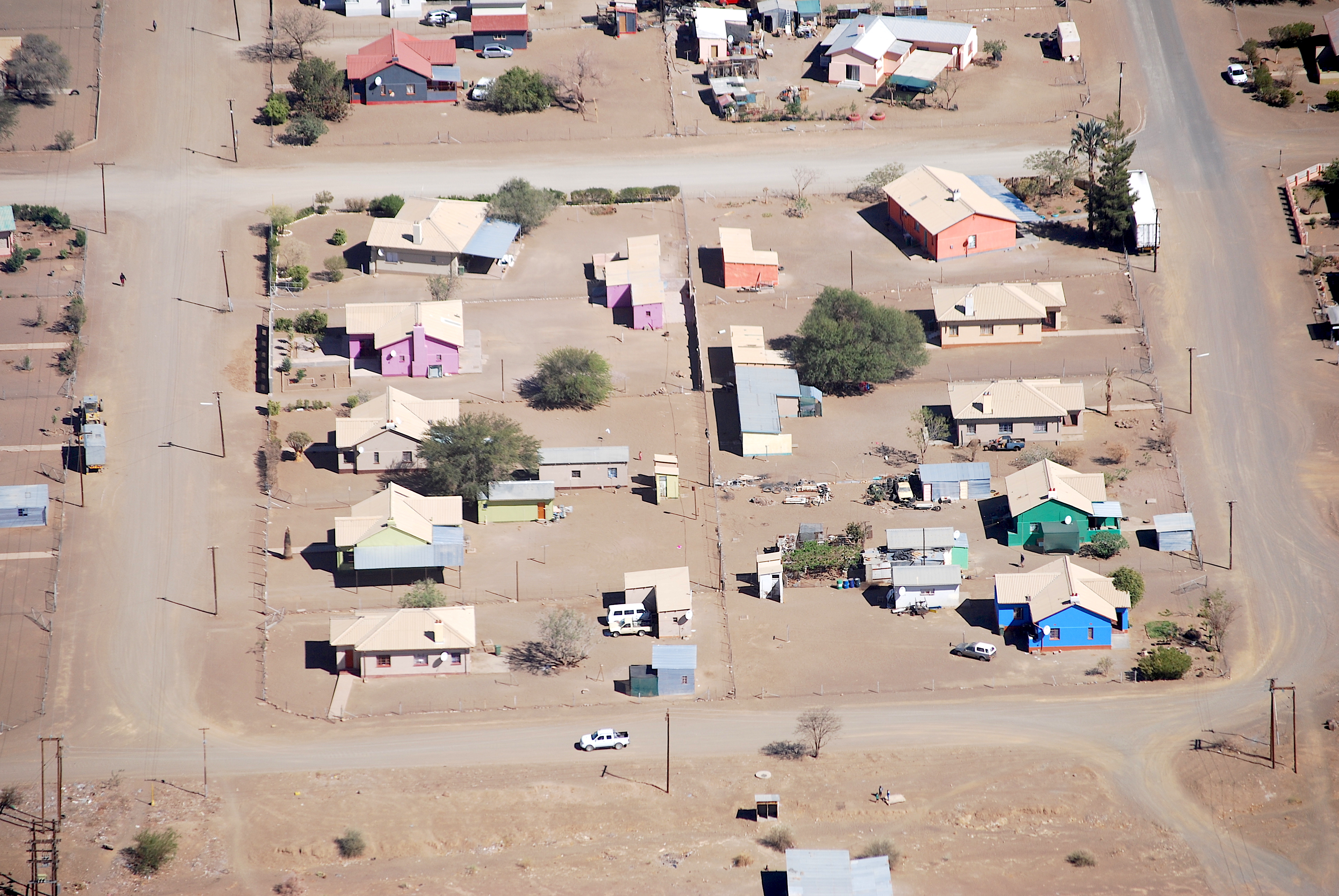 Ortsteil Keetmanshoop